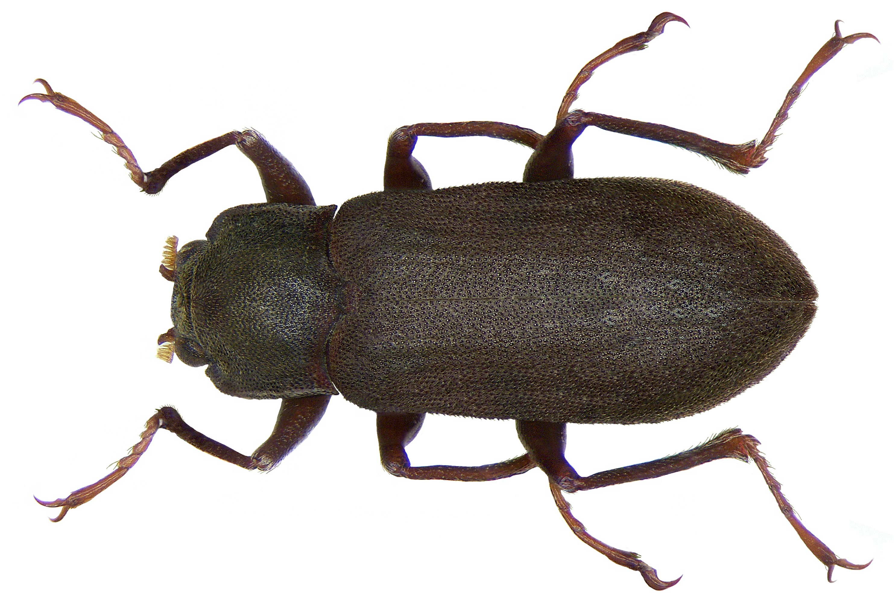 Familie: Dryopidae Größe: 5,6 mm Fundort: Vietnam, SPa leg. J.Strnad, 1991, det. B.S.Boukal, 1994 Foto: U.Schmidt, 2008